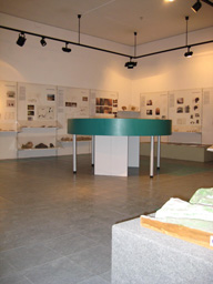 Sala d'exposició del Museu Arqueològic de l'Esquerda